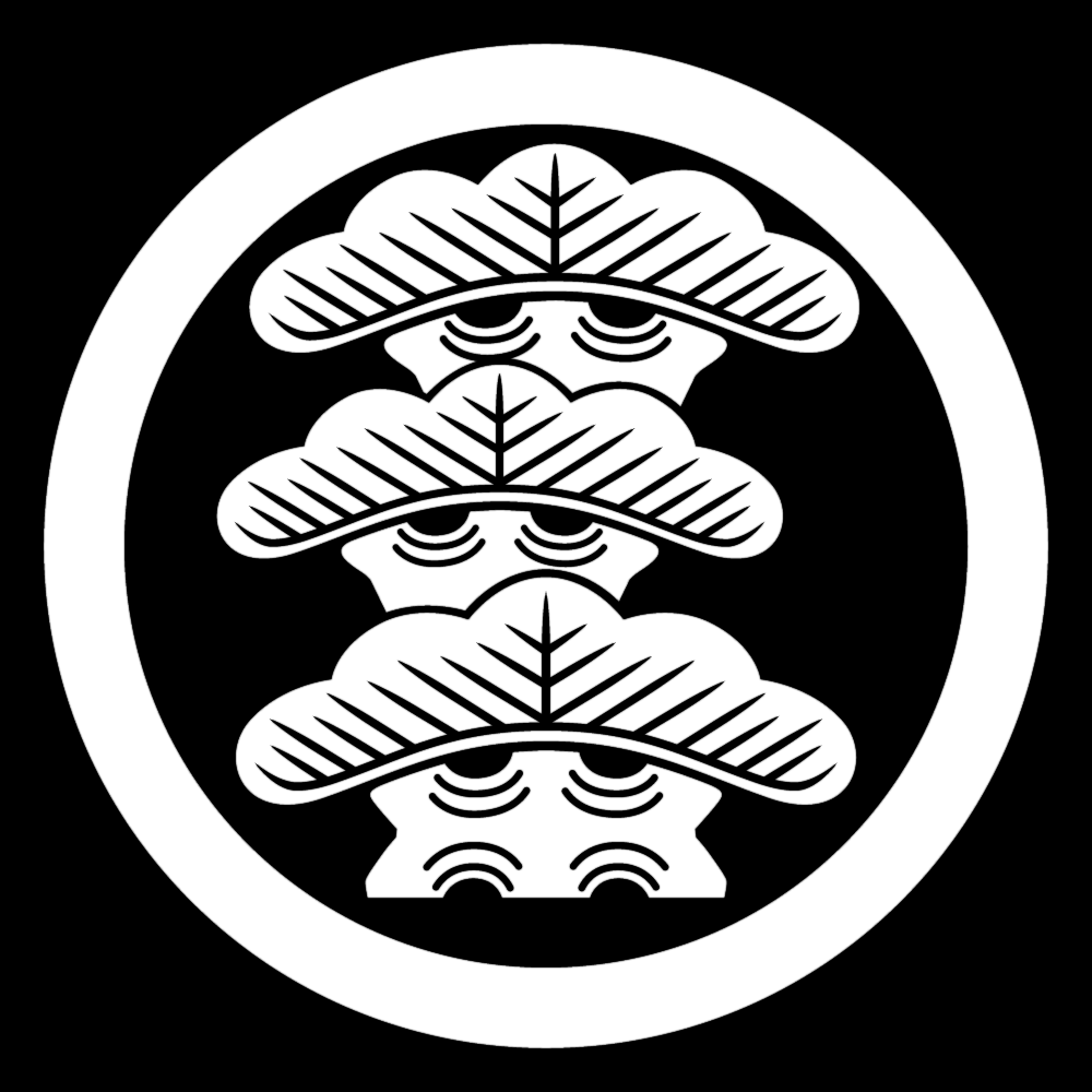 家紋・松の一種、「丸に左三階松」。